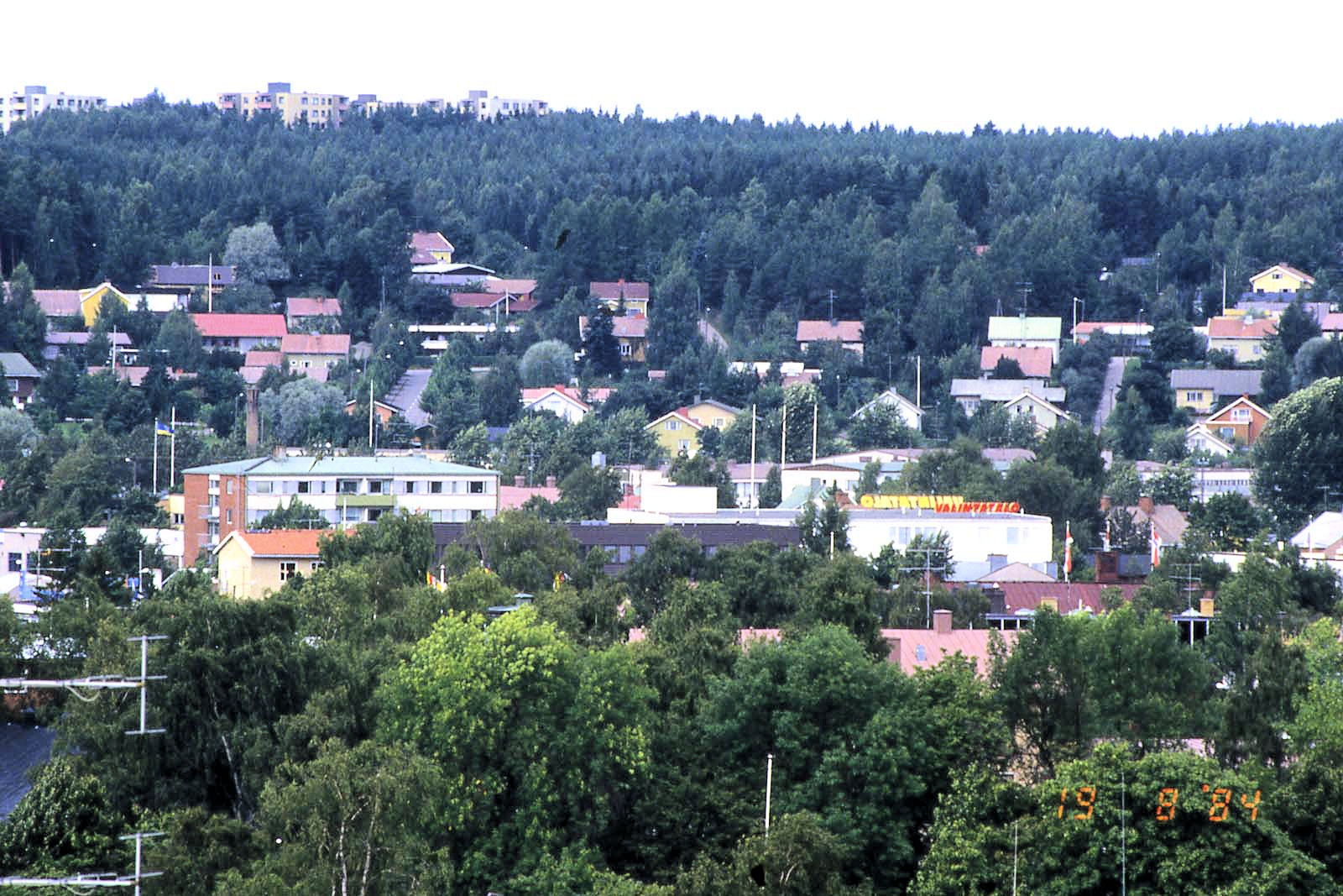 Kaupunkikuvaa Salosta vuonna 1984